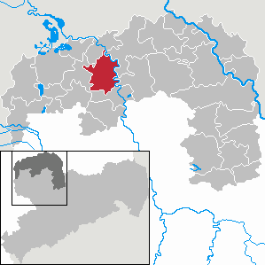 Zschepplin in Saxony - Landkreis Nordsachsen